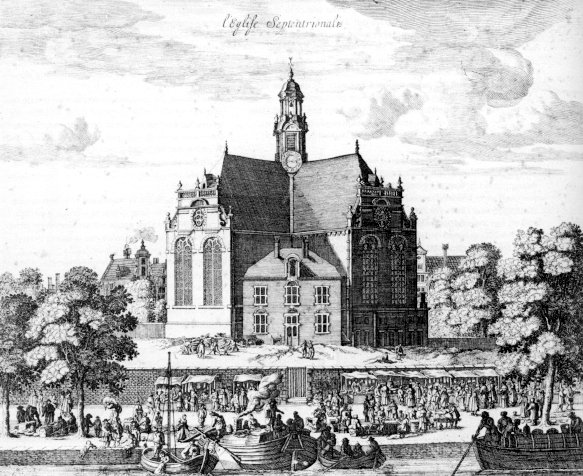 Noorderkerk in de 17e eeuw.